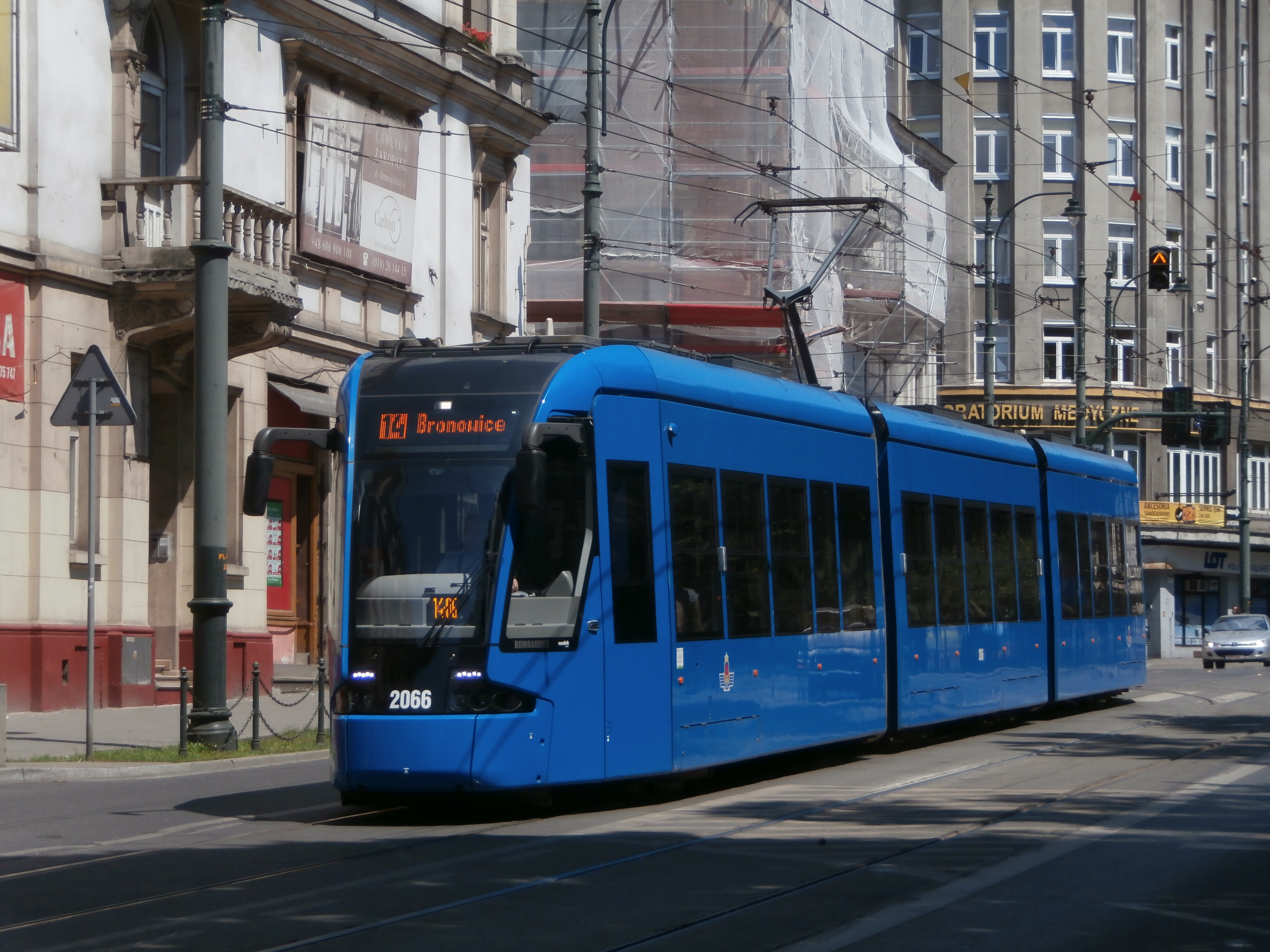 Bombardier NGT8 #2066 na ulicy Basztowej podąża mejestatyczną linią 14 w kierunku Bronowic, Kraków.